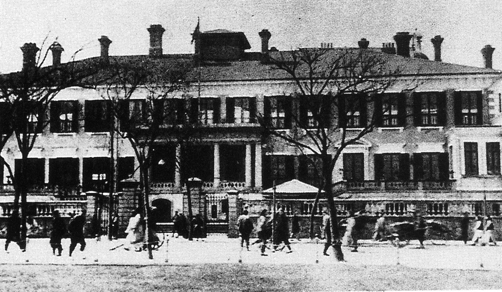 清末时期的外滩怡和洋行大楼